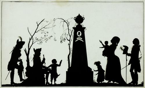 Silhouettenbild: Die Familie des Friedrich Wilhelm von Bauer vor dessen Grabmonument; Schwarze Tusche. 38 x 61,5 cm, Johann Friedrich Anthing zugeschrieben, im September 2012 bei Scheublein Auktionen verkauft